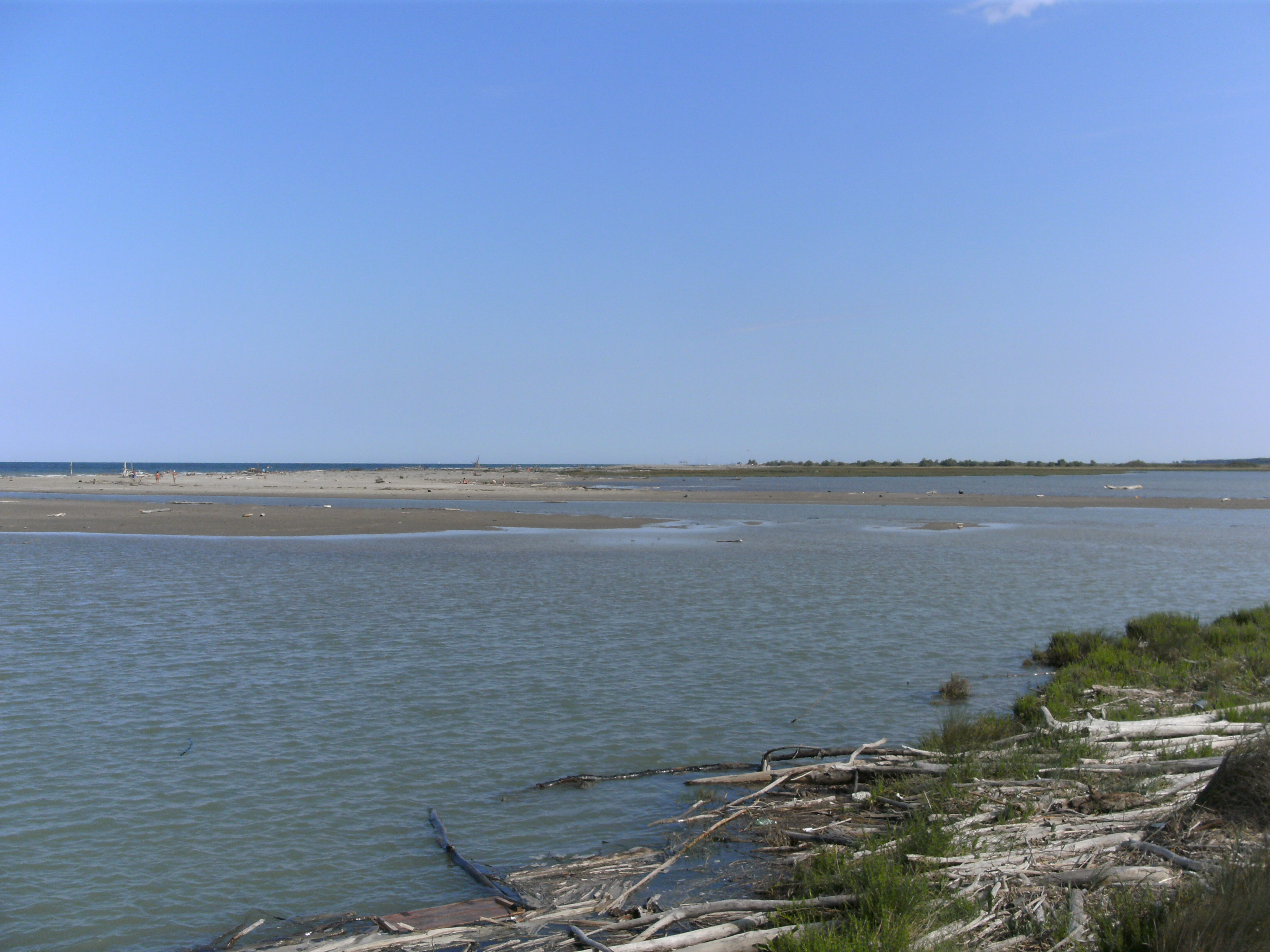 Lido di Spina (Comacchio, FE), Naturschutzgebiet südlich von Lido di Spina